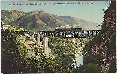 Eisenbahnviadukt über den Astico